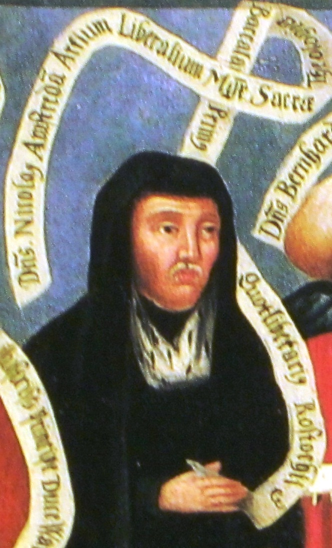 Bild Nikolaus Amsterdam. Ausschnitt aus der Rubenow-Tafel